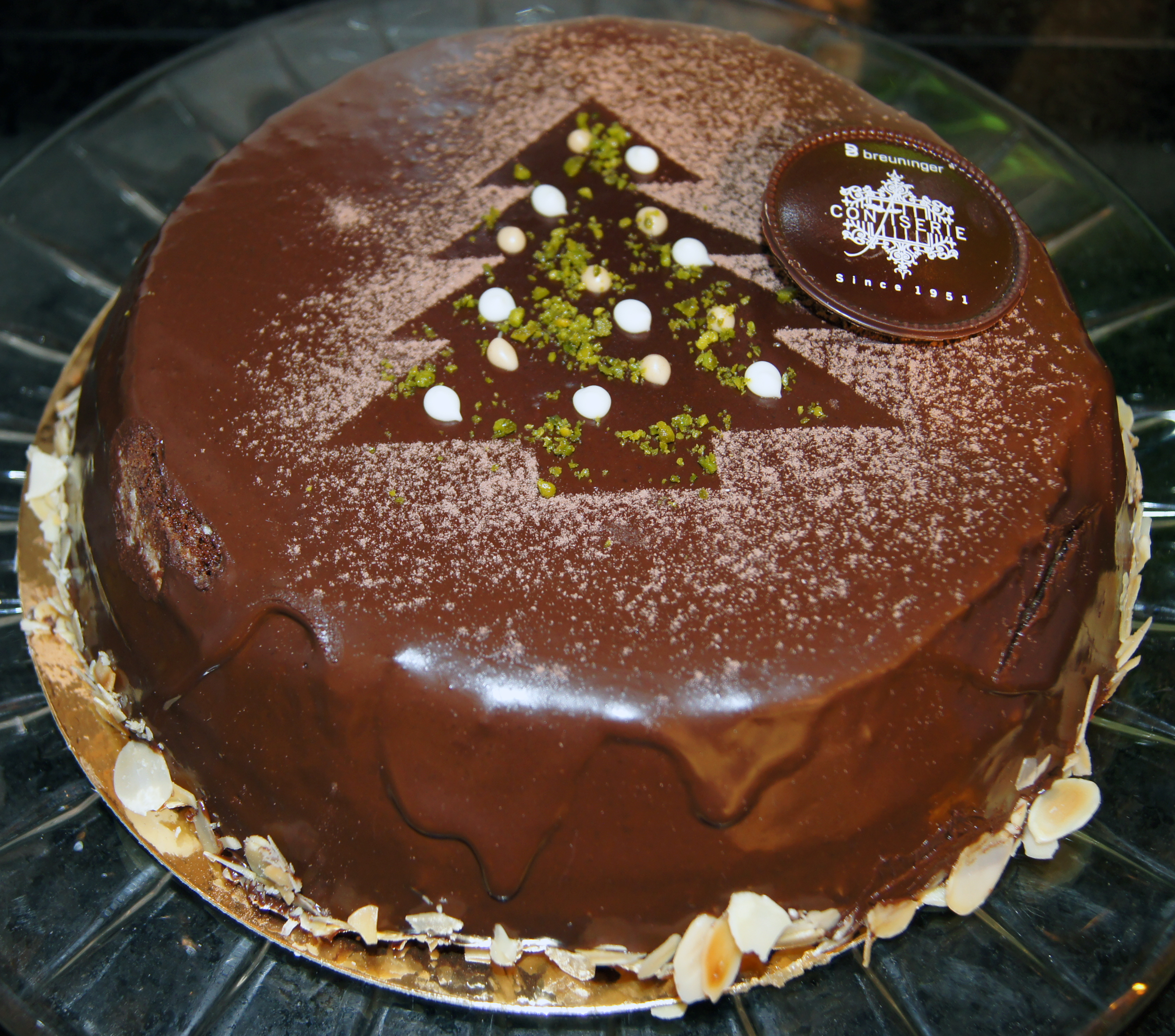 Schokoladen-Weihnachtstorte, Stuttgart